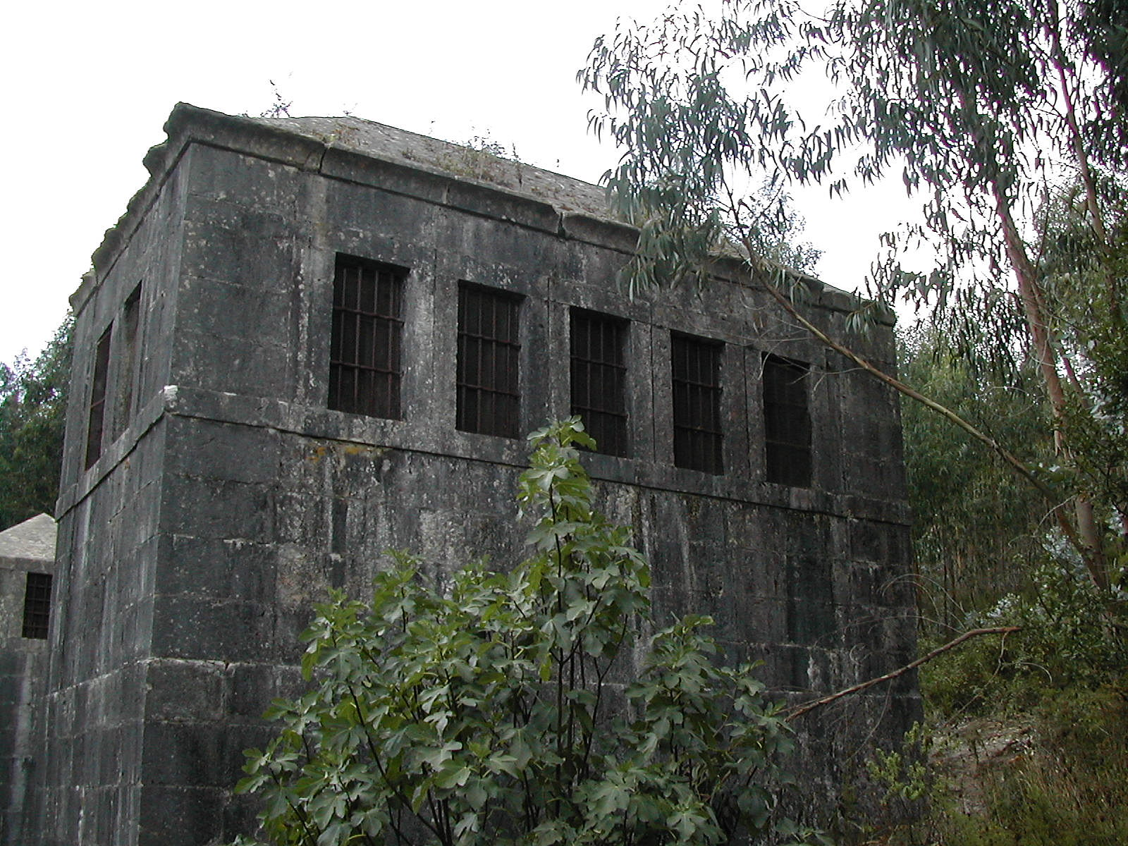 Respiradouro, Aqueduto da Quintã, Aqueduto das Águas Livres, Belas, Sintra, Portugal